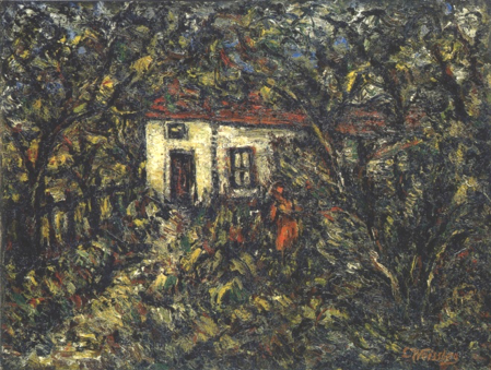 Tableau La maison dans les arbres, de Léon Weissberg